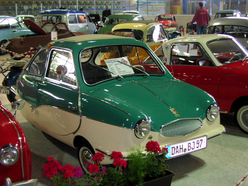 Fuldamobil 200, 1957